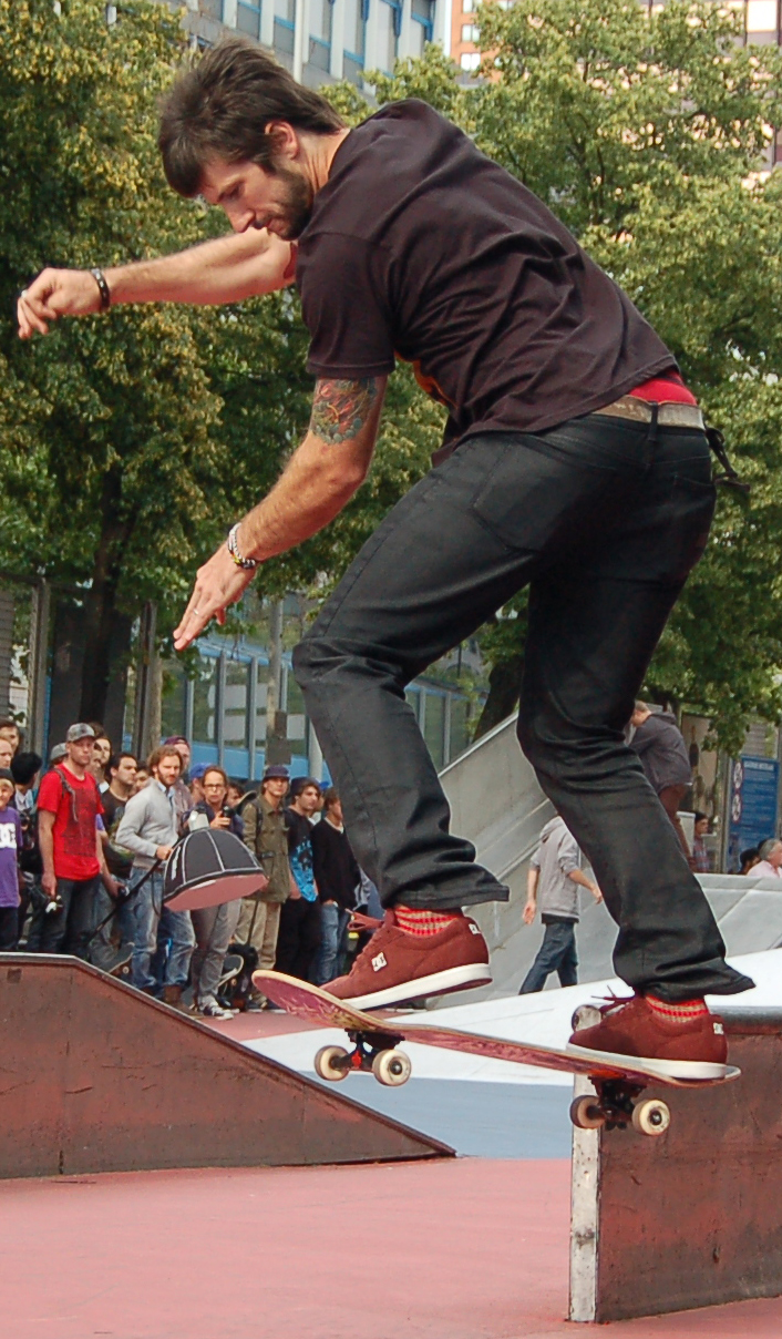 Skateboarder Chris Cole tijdens een evenement in Rotterdam.